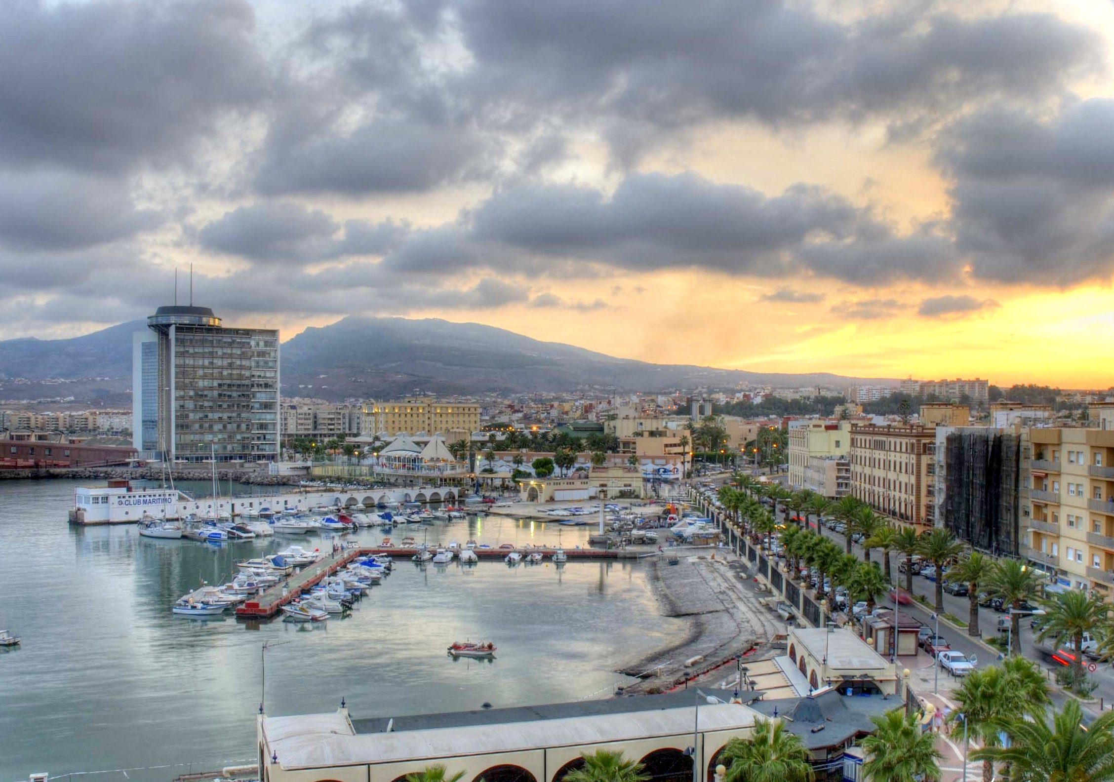 Vista desde Melilla la Vieja